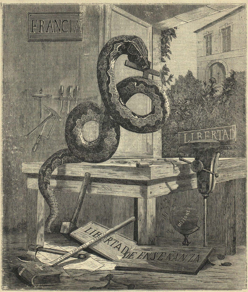 La serpiente y la lima, recogido en la revista española La Ilustración Católica.